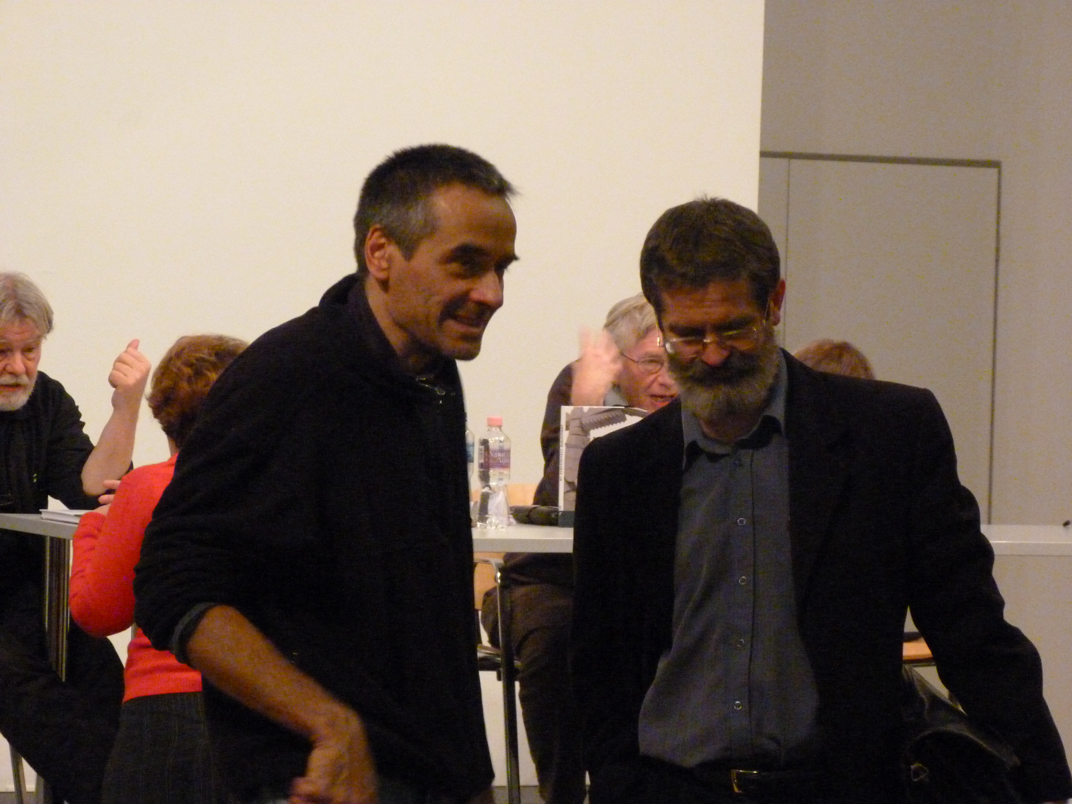 Elek István, jobb oldalon. A felvétel 2011. november 28 –án hétfőn készült Budapesten, az OSA Archivum Budapest, Arany János u. 32 szám alatti épületében. Az Eötvös Károly Intézet a Rendszerkritikai Esték keretében “Az elveszejtett Alkotmány” címmel tartott “rendszerkritikai” kerekasztal-beszélgetést. A beszélgetésen részt vettek: Elek István közíró, Erős Ferenc társadalompszihológus, Majtényi László alkotmányjogász, Szabó Máté és Parti Nagy Lajos író. Zenélt: Dés László, felolvasott: Parti Nagy Lajos. A felvétel megjelent Creative Commons alatt a Metapolisz DVD sorozatban.